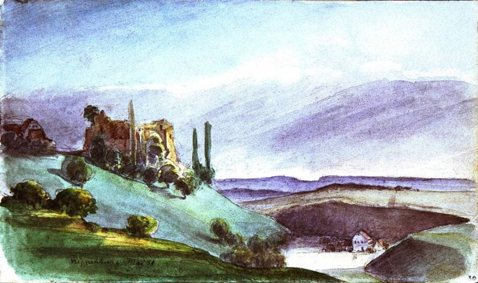 Nippenburg bei Schwieberdingen. Blick übers Tal zur Burgruine. (Aquarell)